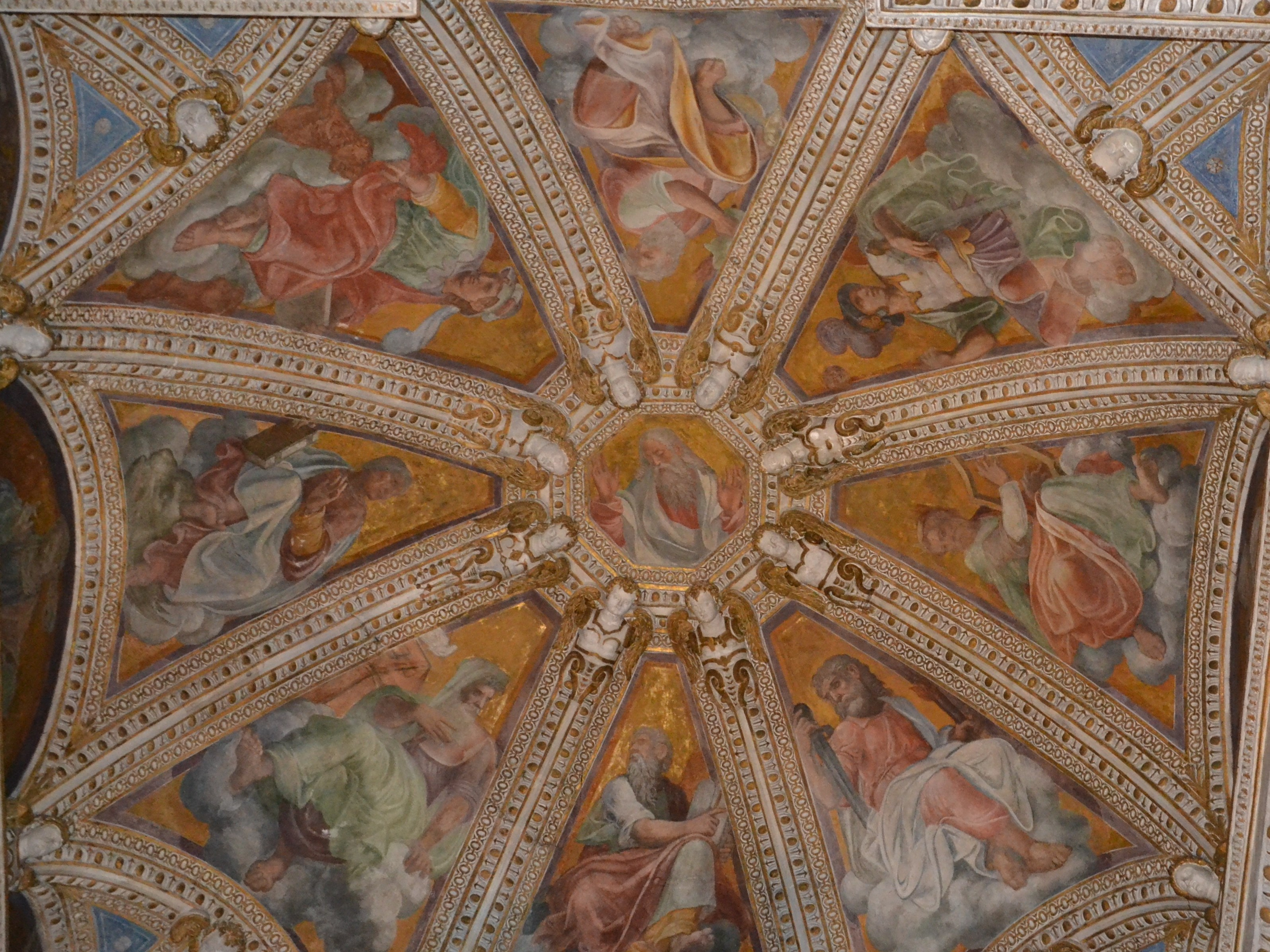 Cappella di San Giovanni Battista, Gli affreschi tardocinquecenteschi sono del manierista Ottavio Semino